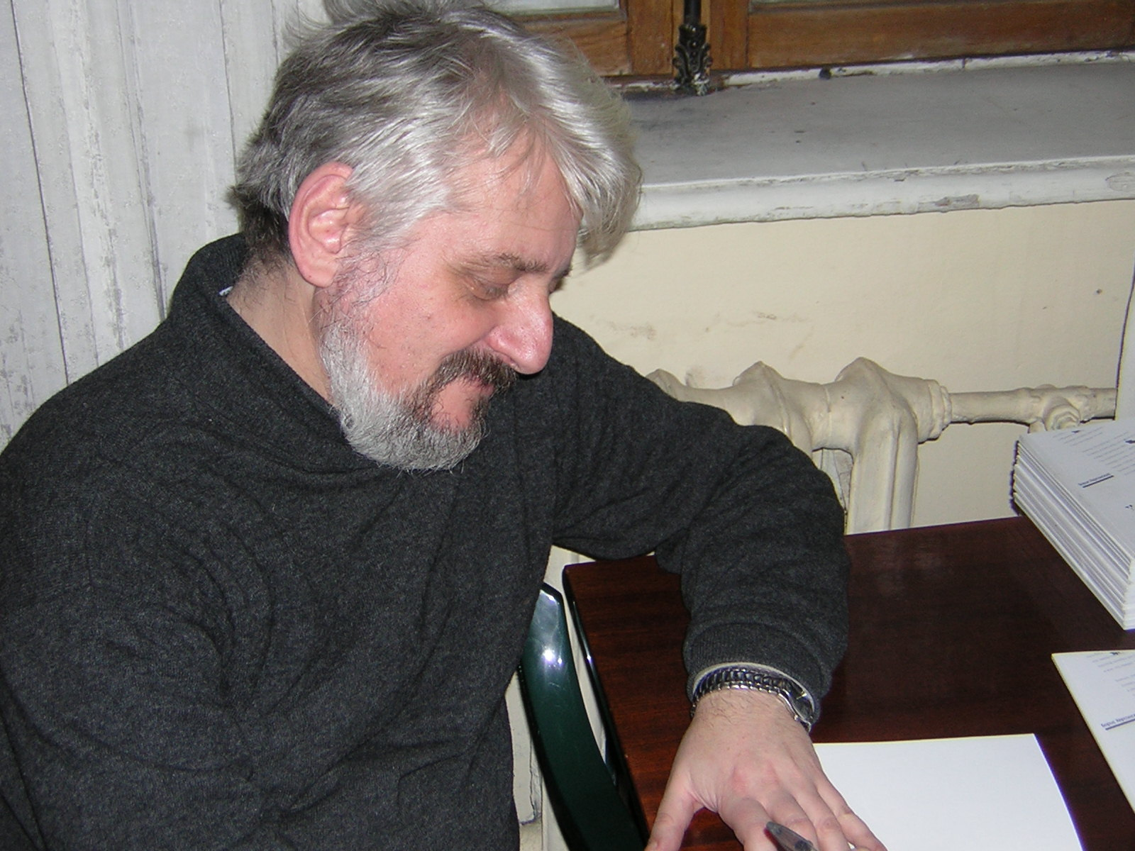 Поэт Борис Григорьевич Херсонский. Презентация книги «Нарисуй человечка», книжный салон «Остров сокровищ», г. Одесса, ул. Ланжероновская, 2